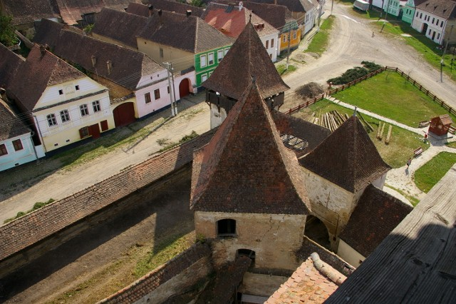 Kirchenburg Arkeden vor Renovierungsarbeiten 2011